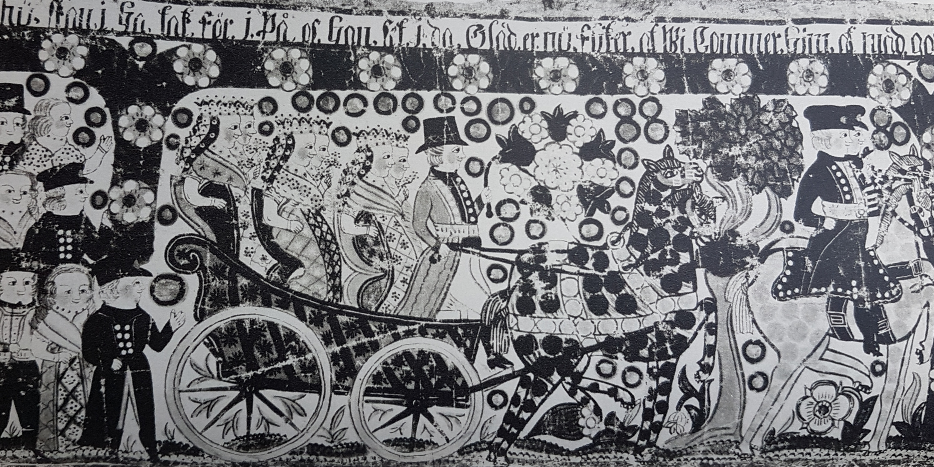 Detaljbild av bonaden Bröllopståg skapad av Johannes Nilsson, avfotograferad bild från Allhems Svenskt konstnärslexikon.